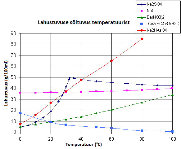 Erinevate soolade vees lahustuvuse sõltuvus temperatuurist